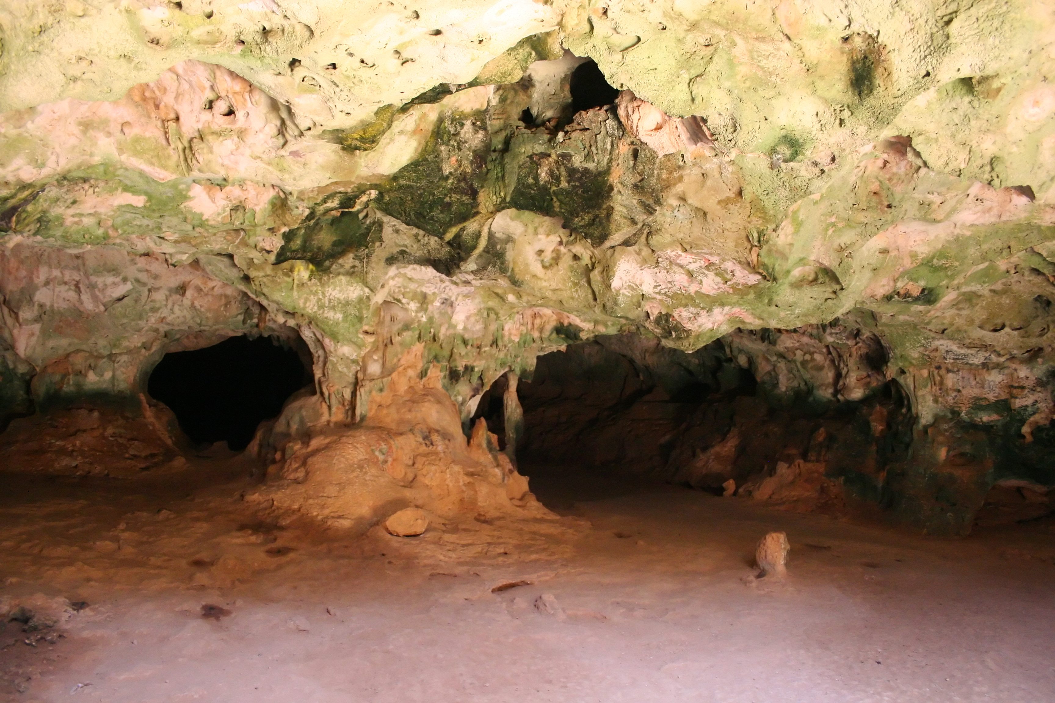 Guadirikiri Cave